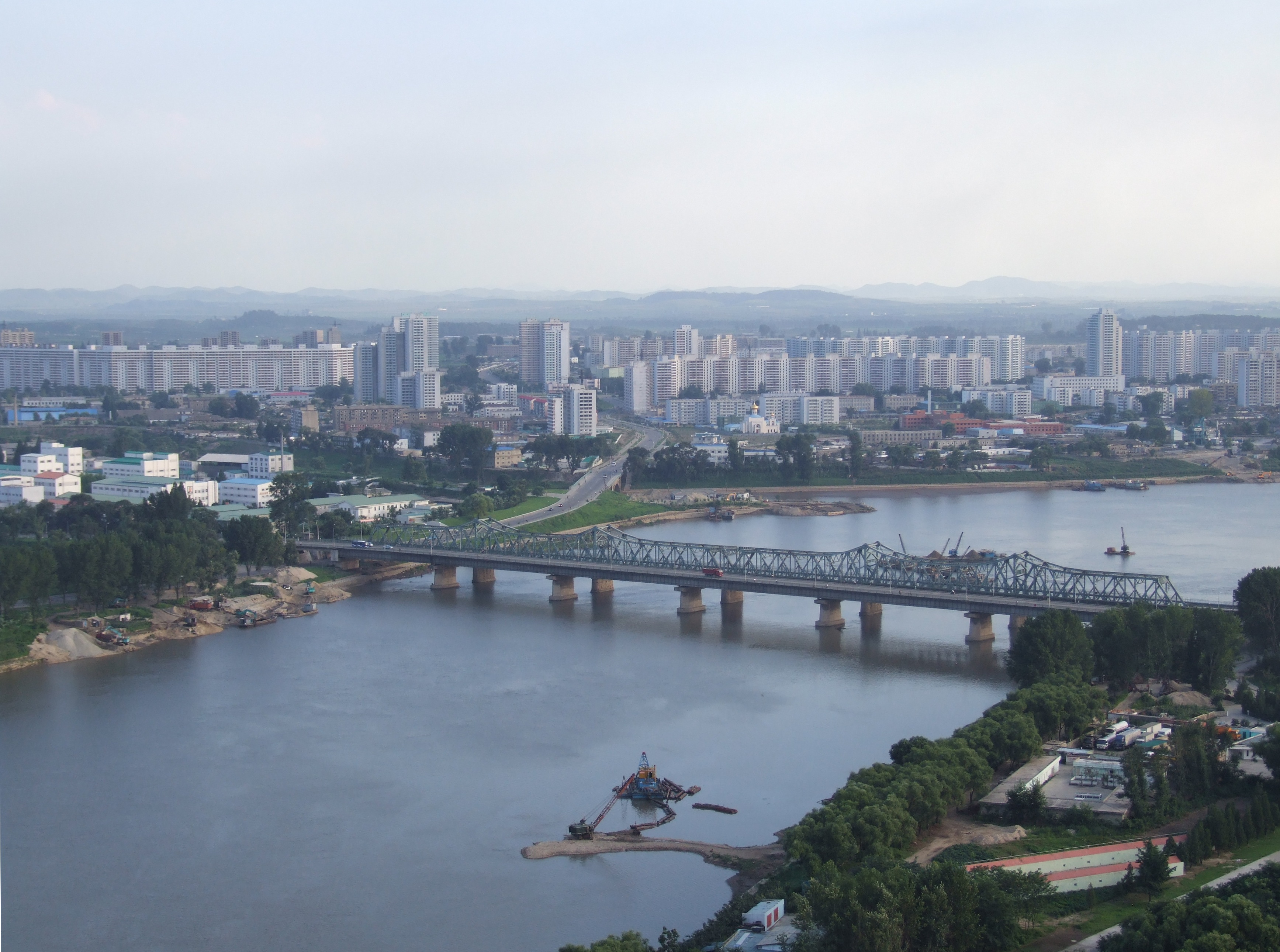 View from Yanggakdo International Hotel to Yongje-dong, Chongo-dong and Chongbaek-dong